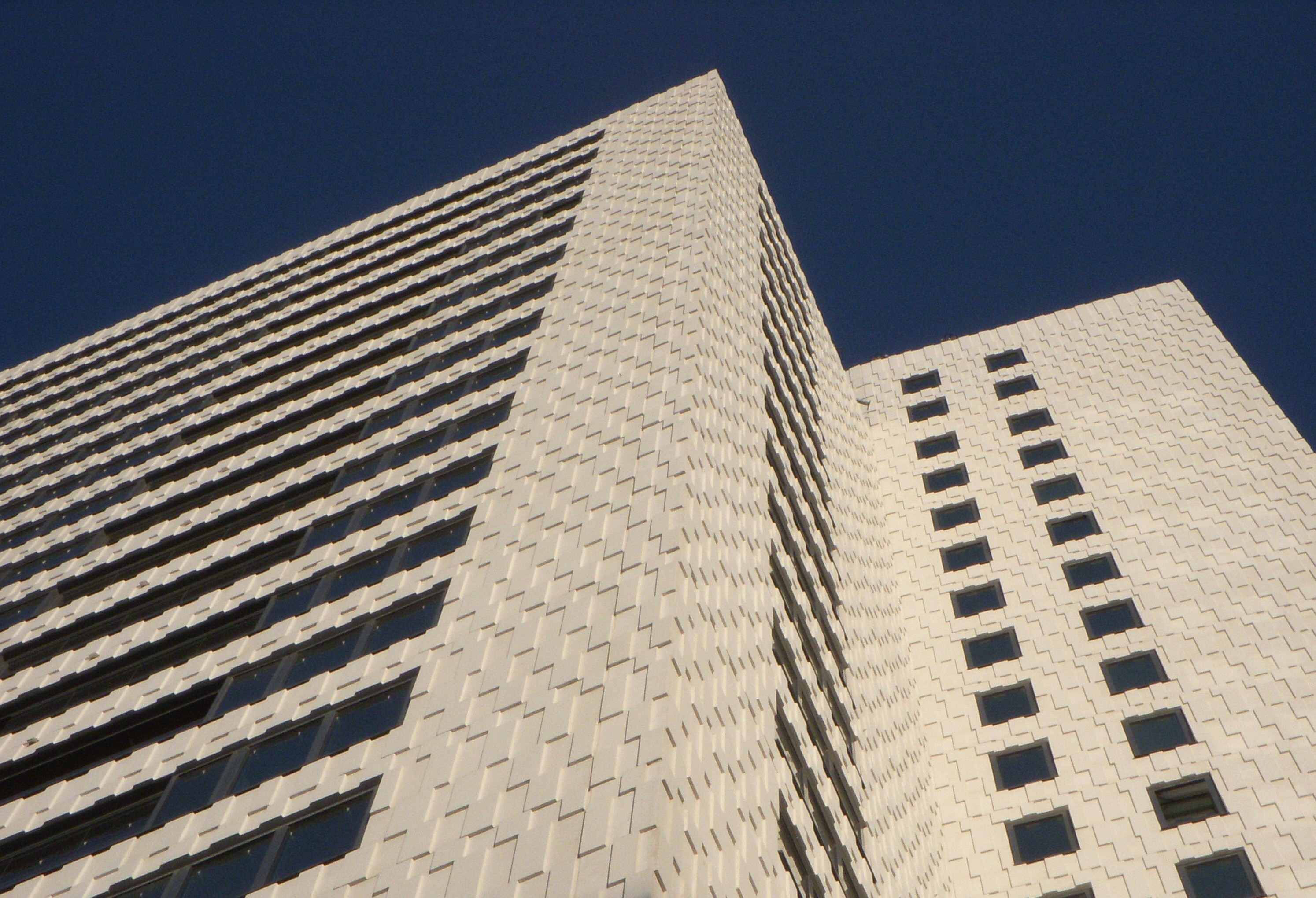 Höghuset i kvarteret Lusten, Hornsbergs strand